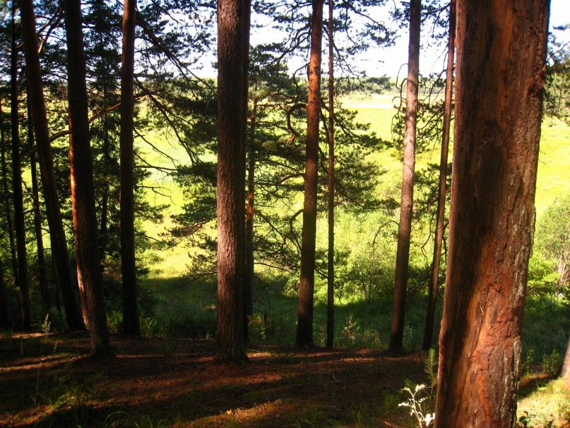 Кувинский бор, Кудымкарский район This image is related to the protected area of Russia number 5910215